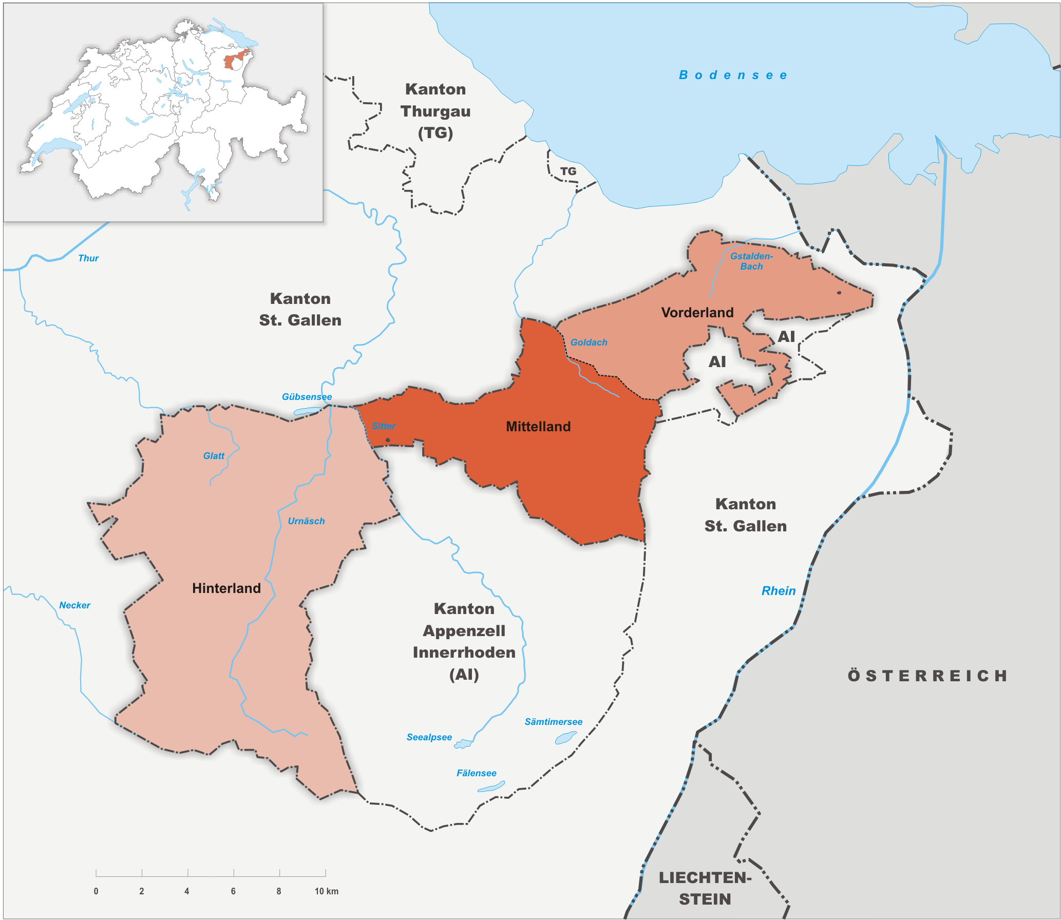 Bezirke des Kanton Appenzell Ausserrhoden bis 1994.